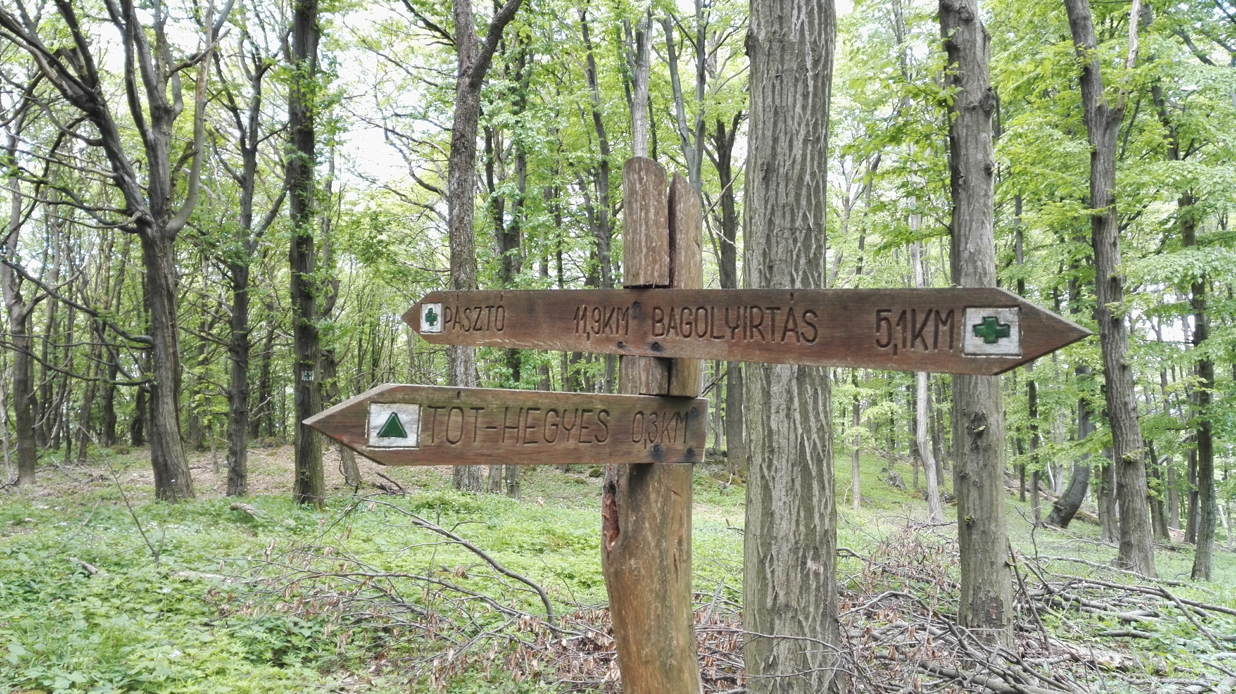 A zöld kereszt és a zöld háromszög jelzések találkozása a Mátrában